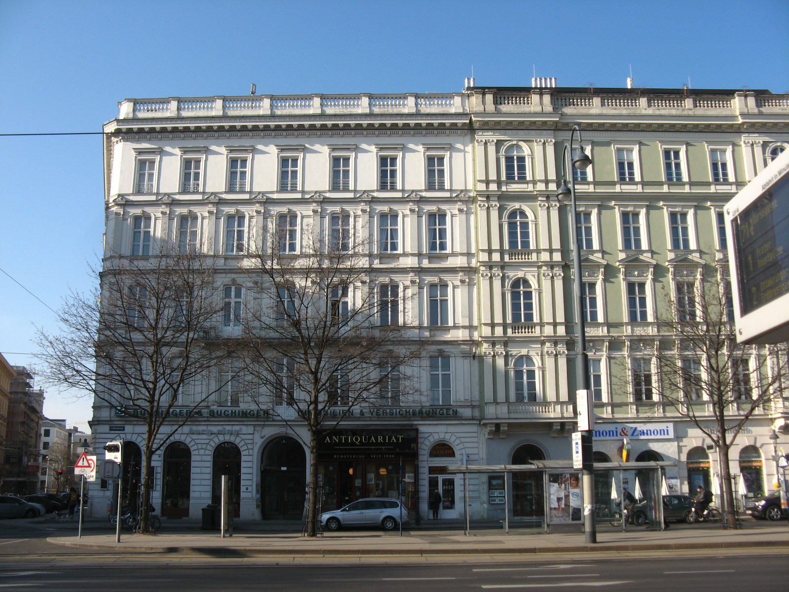 Haus (1862-63) von Romano und Schwendenwein, Burgring 1, Wien-Innere Stadt